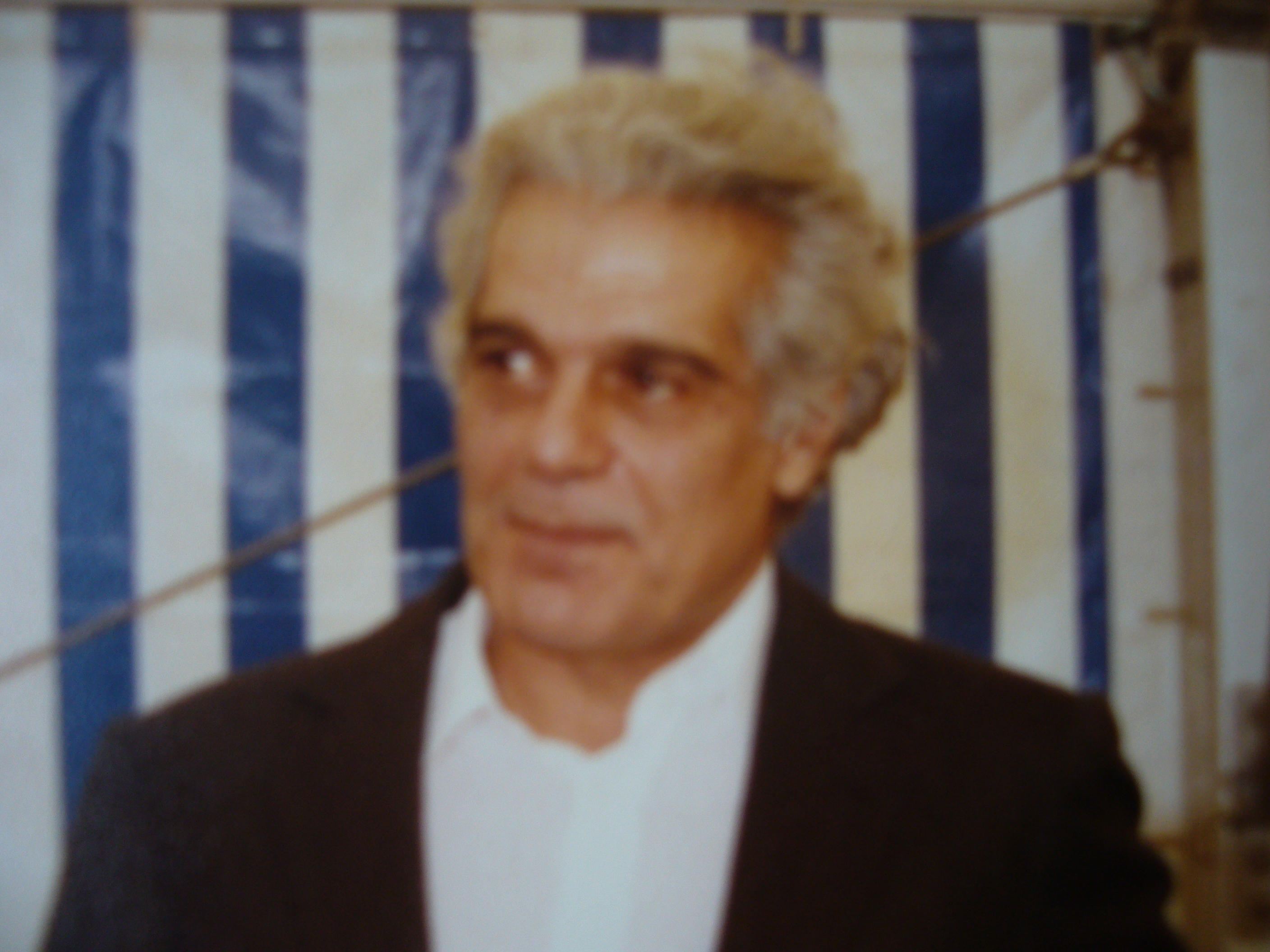 Omar Sharif in een tent op het Malieveld in Den Haag, op bezoek met de Lord Taveners